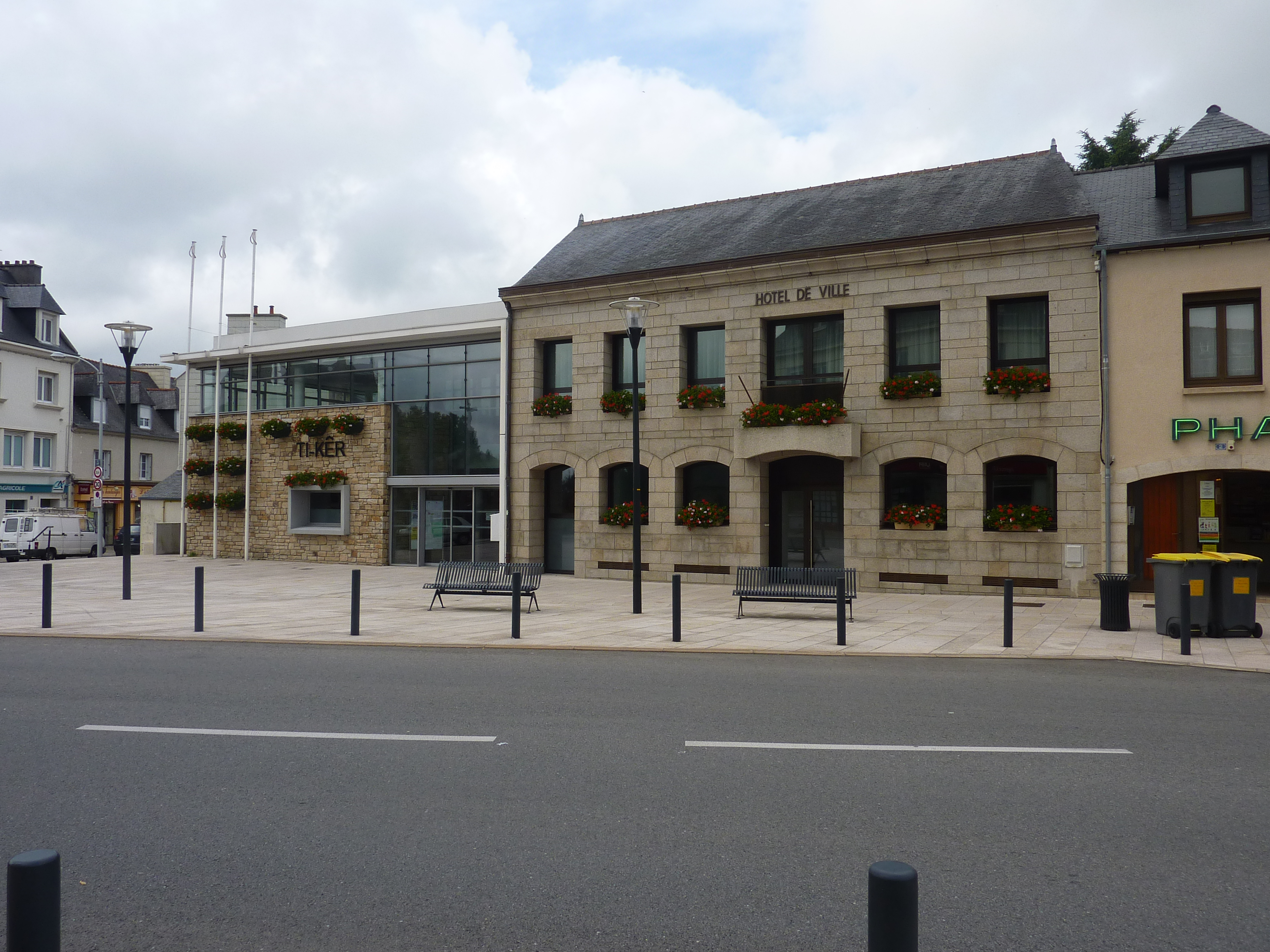 Gouesnou : l'hôtel de ville actuelle